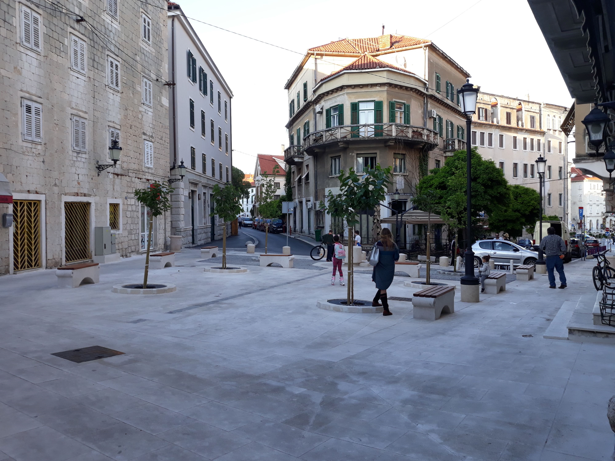 Trg Šperun, Split